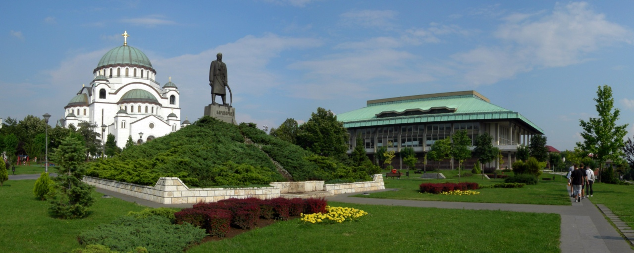 Панорама Светосавског трга на Врачару у Београду: Храм светог Саве, споменик Карађорђу и зграда Народне библиотеке Србије.